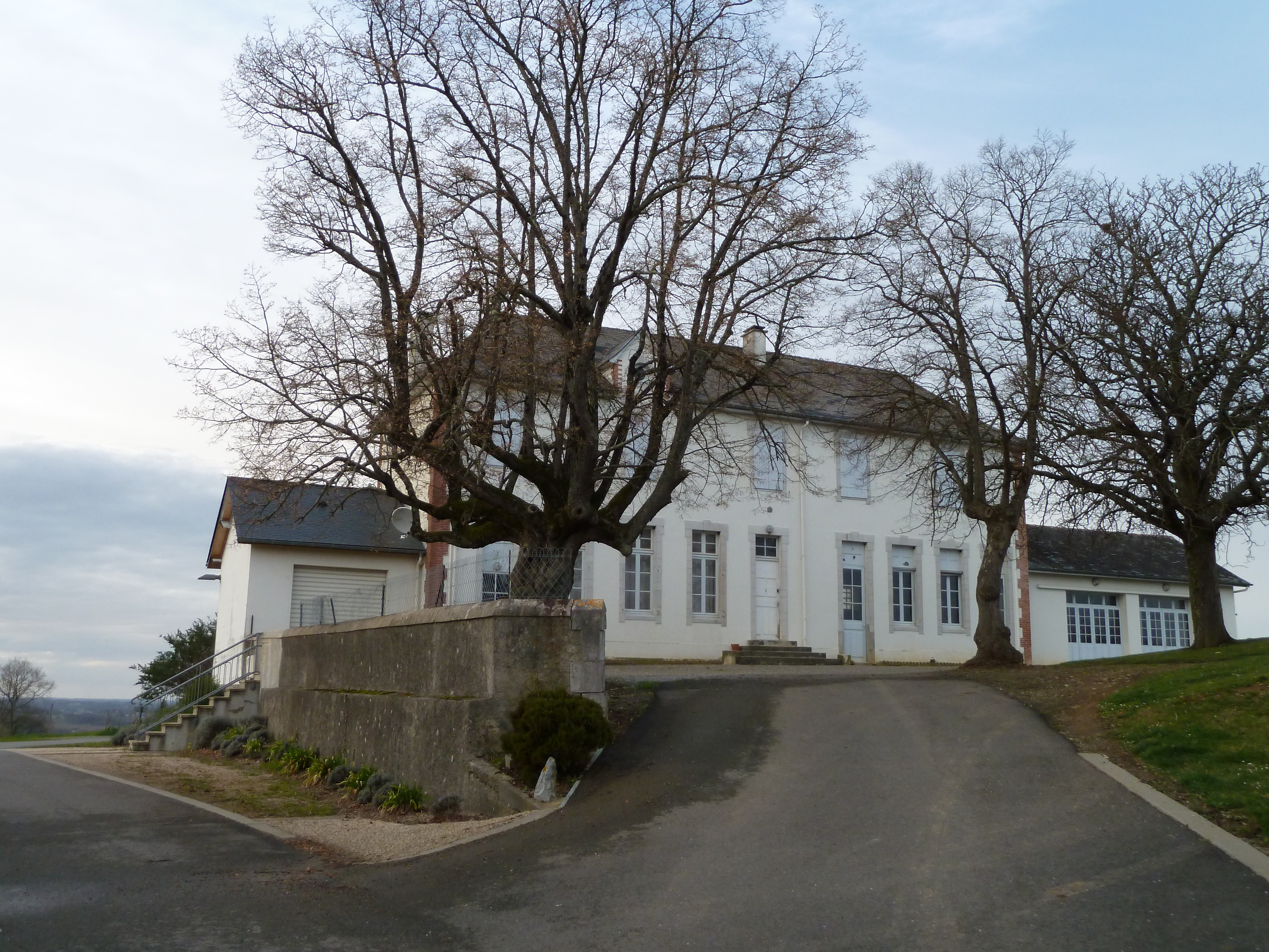 Mairie de Garos